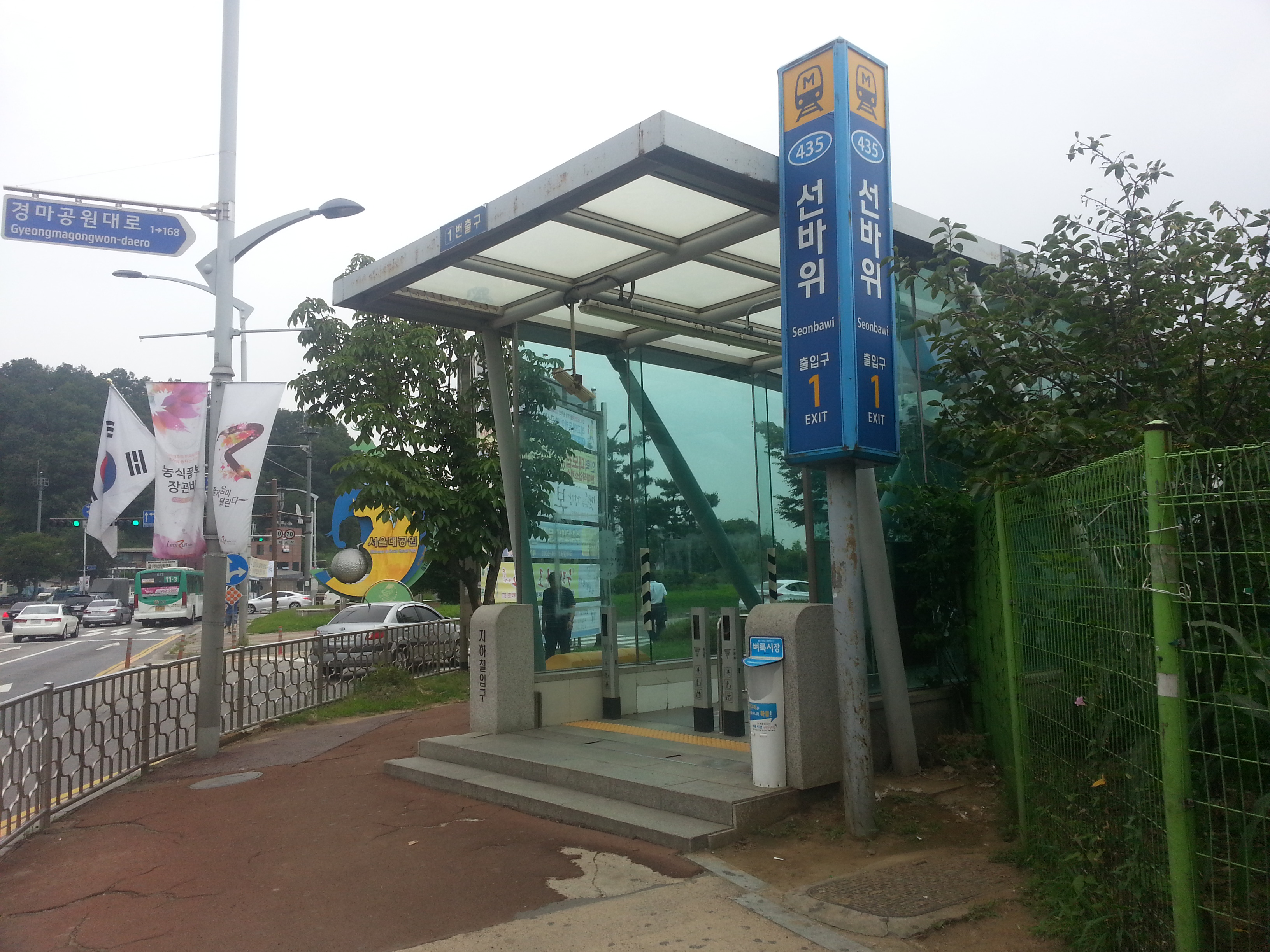 선바위역 1번 출구